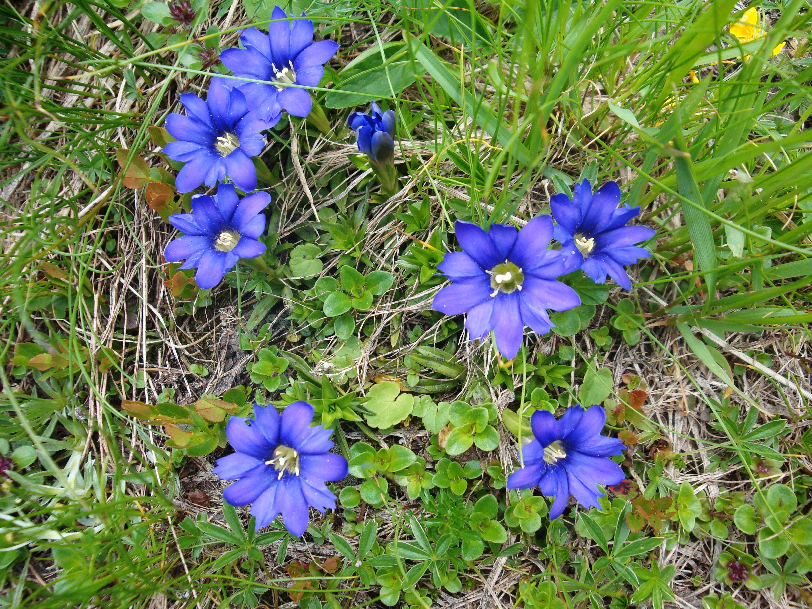 Карпатський біосферний заповідник, Рахівський, Тячівський, Хустський, Виноградівський райони